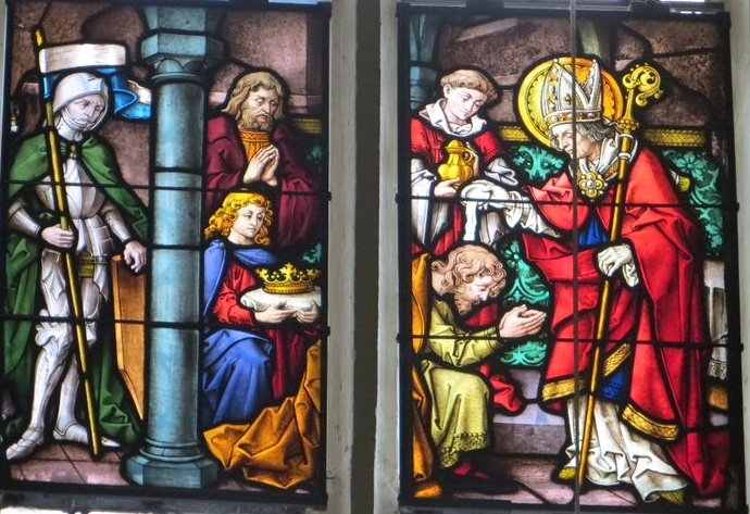 Taufe des Frankenherzogs Gosbert durch St. Kilian, Glasmalerei von Matthäus Schiestl (1869-1939), in der Stadtpfarrkirche Maria vom Rosenkranz in Gerolzhofen